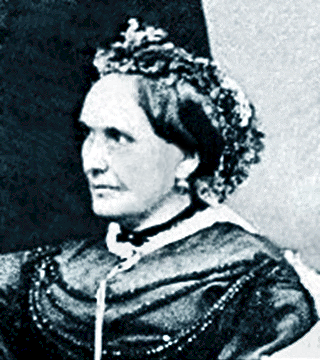 Eva Aloisia Schreher, Gattin des FZM Wilhelm Freiherrn Lenk von Wolfsberg 1865